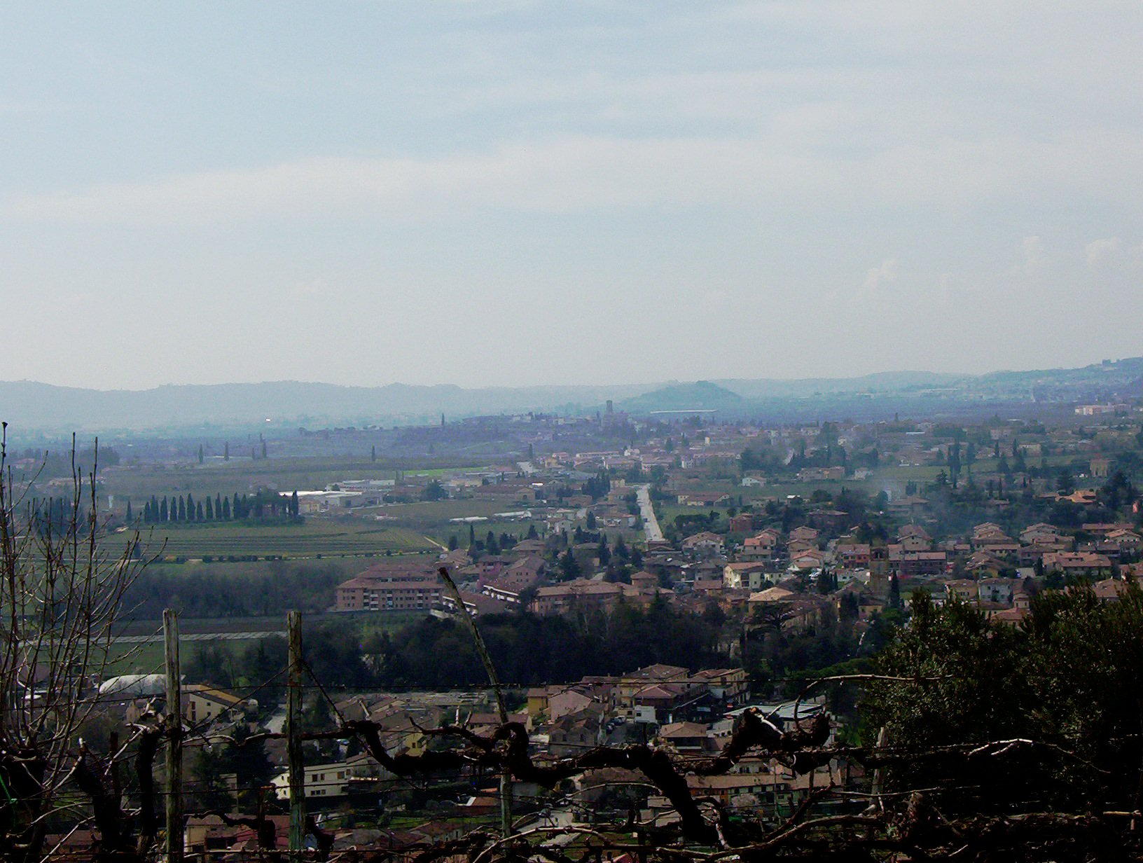 Vista di parte del comune di San Pietro in Cariano